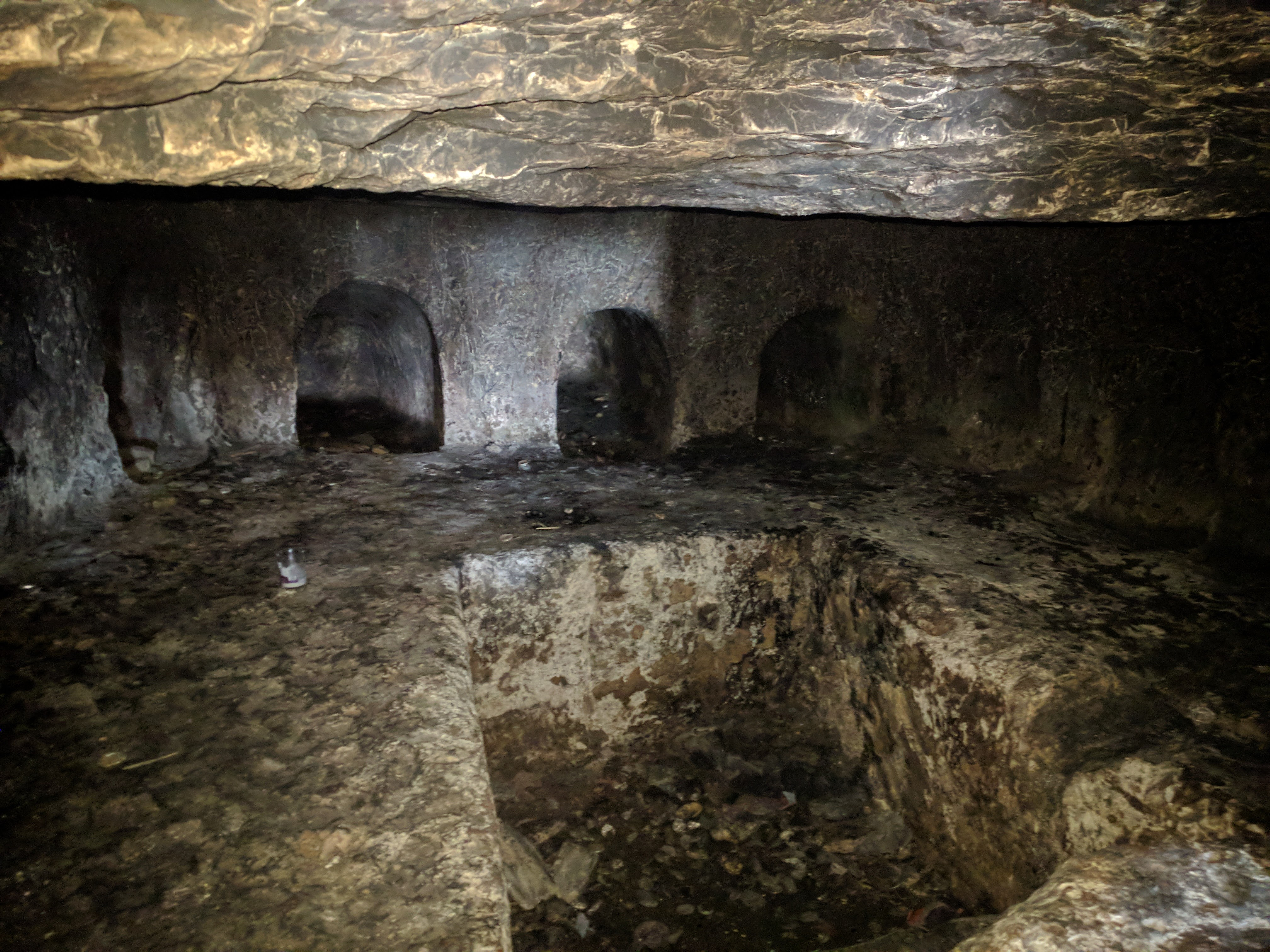 פנים קבר המיוחס לעותניאל בן קנז